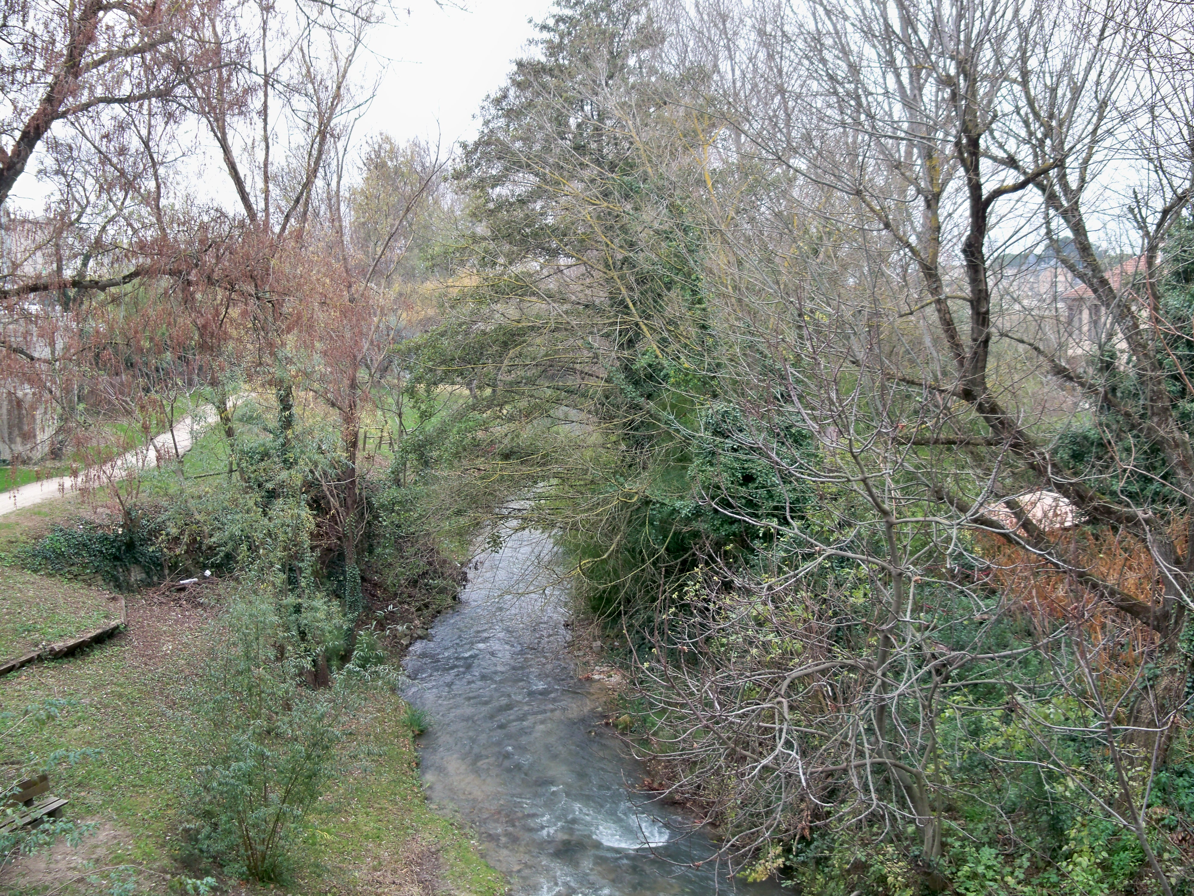 L'Auzon à Carpentras (Vaucluse, France)